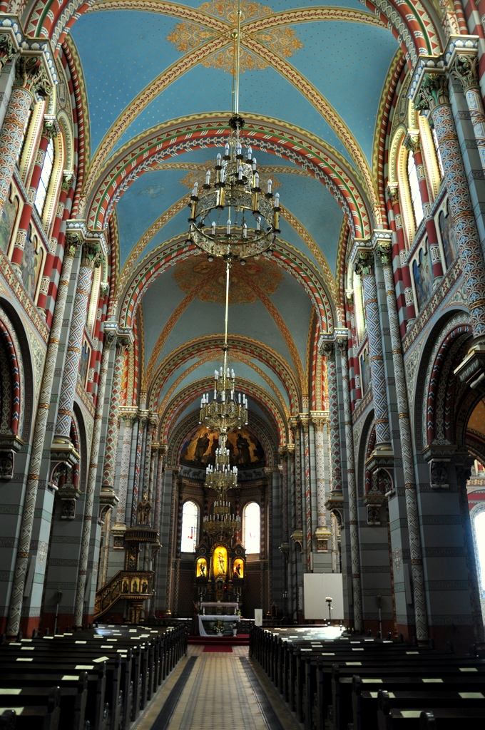 Rákospalotai Magyarok Nagyasszonya főplébániatemplom This is a photo of a monument in Hungary, Identifier: 13946